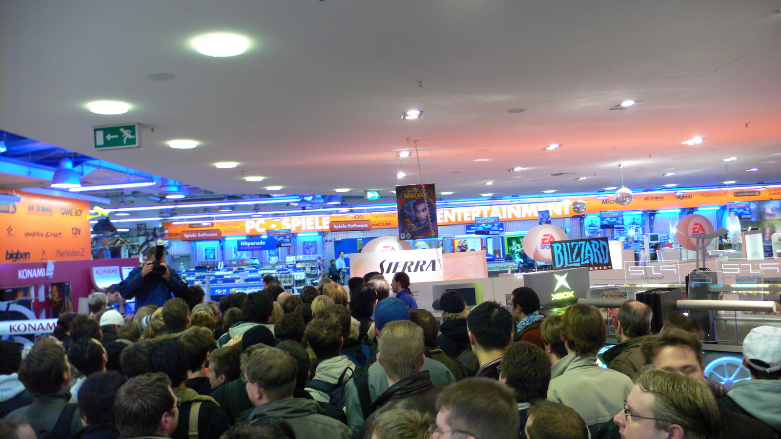 Wii Launch Hamburg - Im Saturn